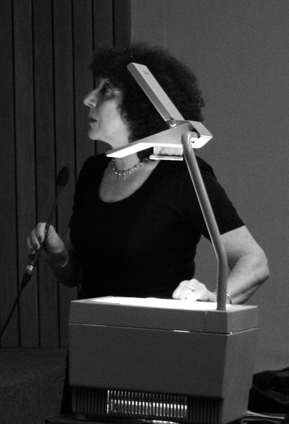 Cette Image a été prise par un ami un moi lors d'une conférence a l'ULB co-organisée par moi même. elle est libre de droits.